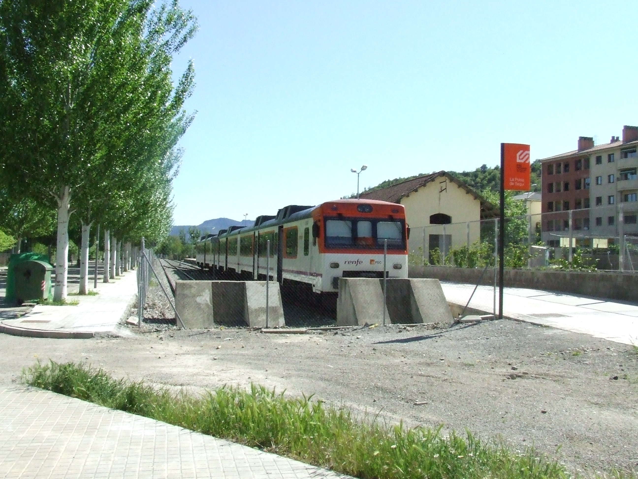 Les andanes de l'estació actual (la Pobla de Segur, Pallars Jussà)